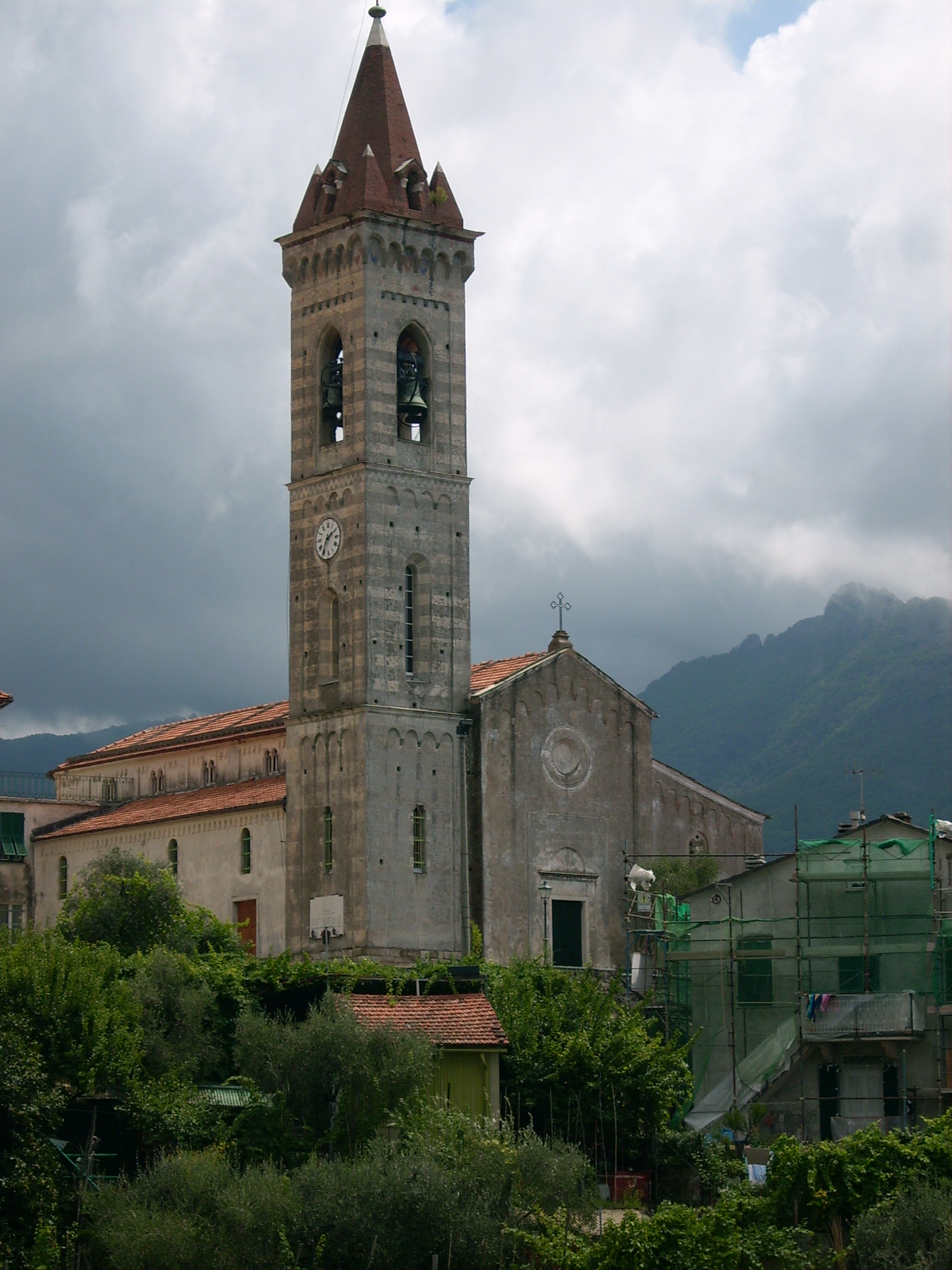 Chiesa di santa Maria Assunta di Missano, Castiglione Chiavarese, Liguria, Italia